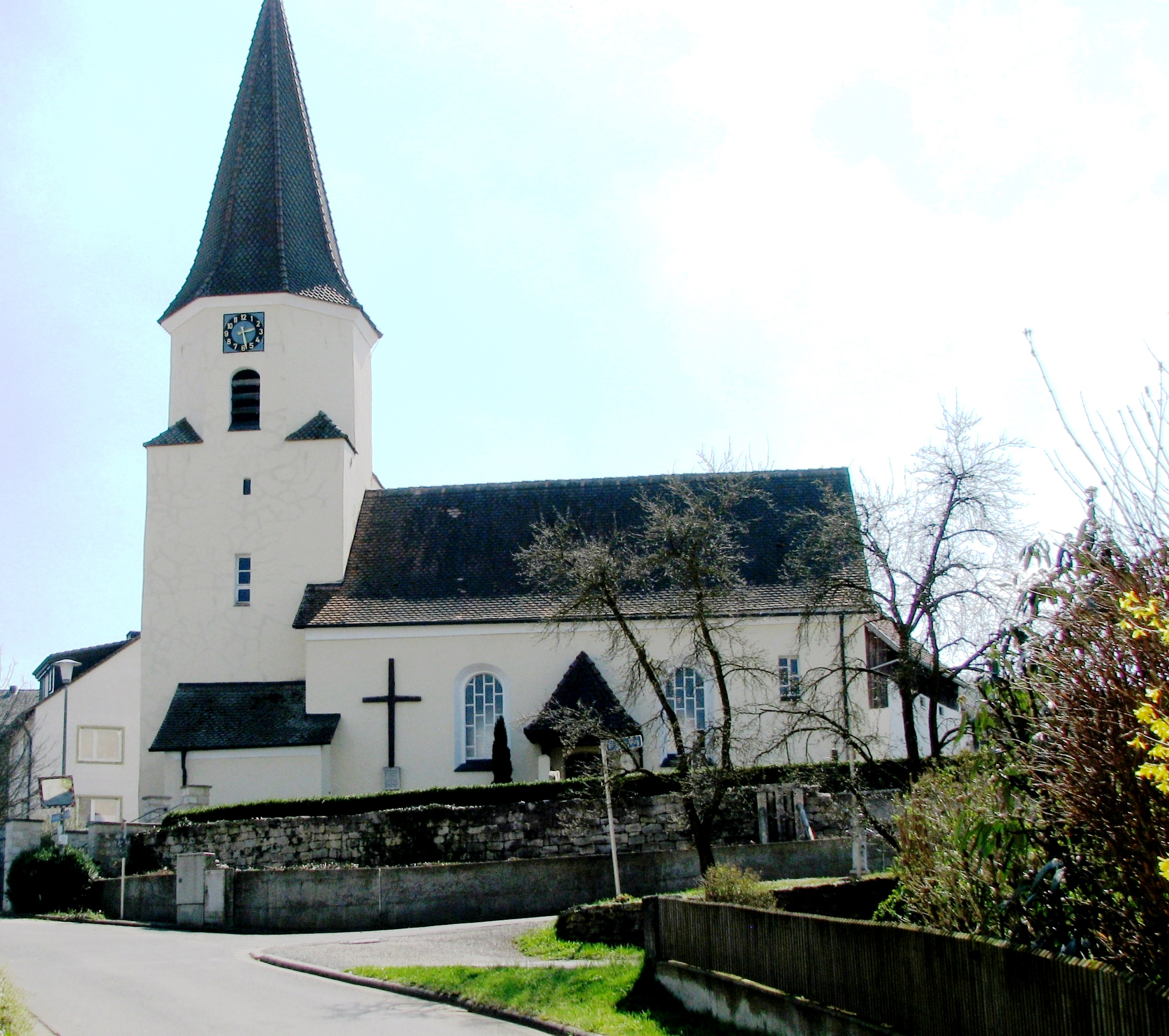 Hofen, Ortsteil der Gemeinde Mühlhausen im Landkreis Neumarkt in der Oberpfalz, evangelische Willibaldskirche